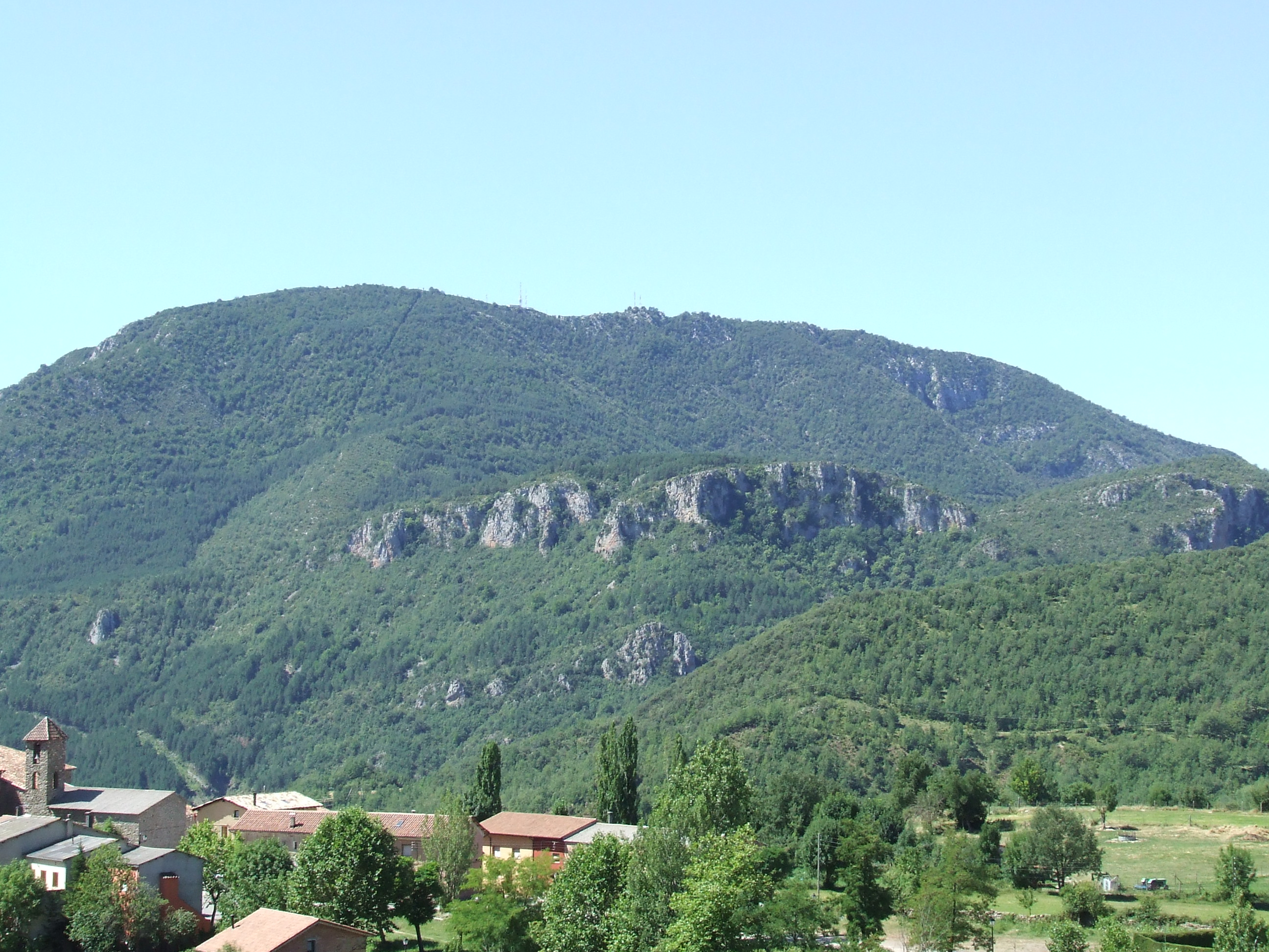 La Faiada de Malpàs (El Pont de Suert, Alta Ribagorça)